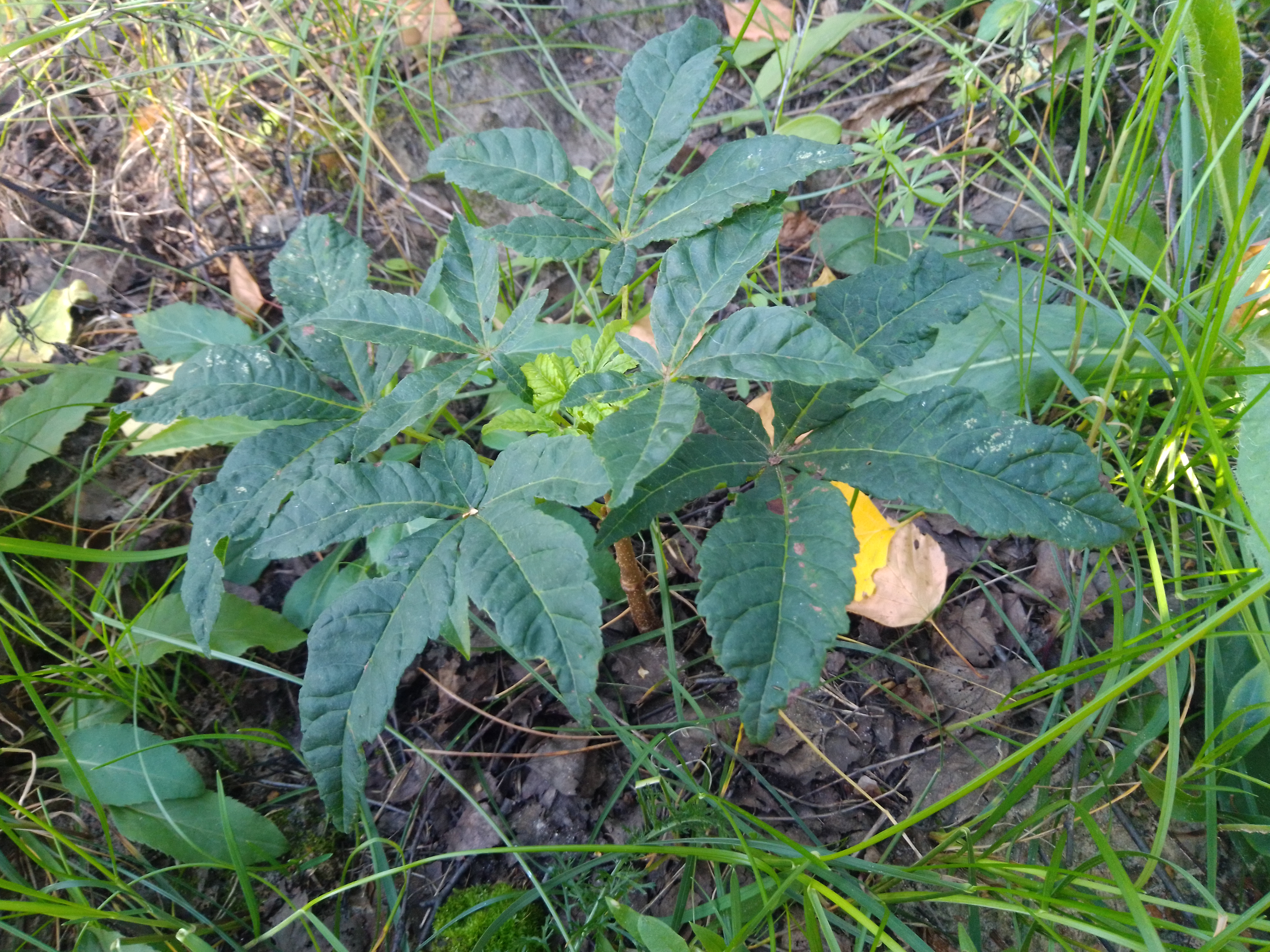 Саженец конского каштана на 1-м году жизни, распустивший за один год 3 материнские почки после того, как пострадал от засухи ещё при формировании первых листьев (внизу на стволе можно увидеть рубцы от первых оторванных листьев)